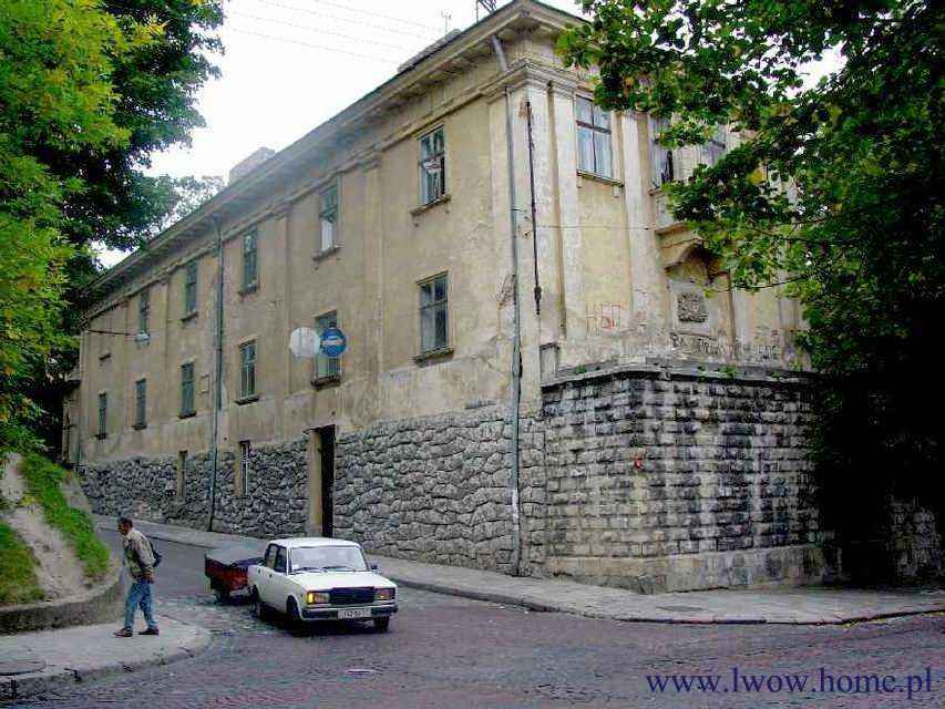 Lwowska siedziba Biblioteki Baworowskich - fotografia wykonana we wrześniu 2003. Autor: Stanisław Kosiedowski